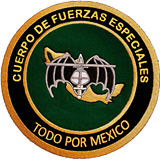 Escudo CFE 3D